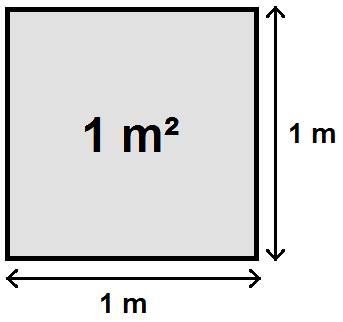 Un carré d'un mètre de côté, soit un mètre carré.